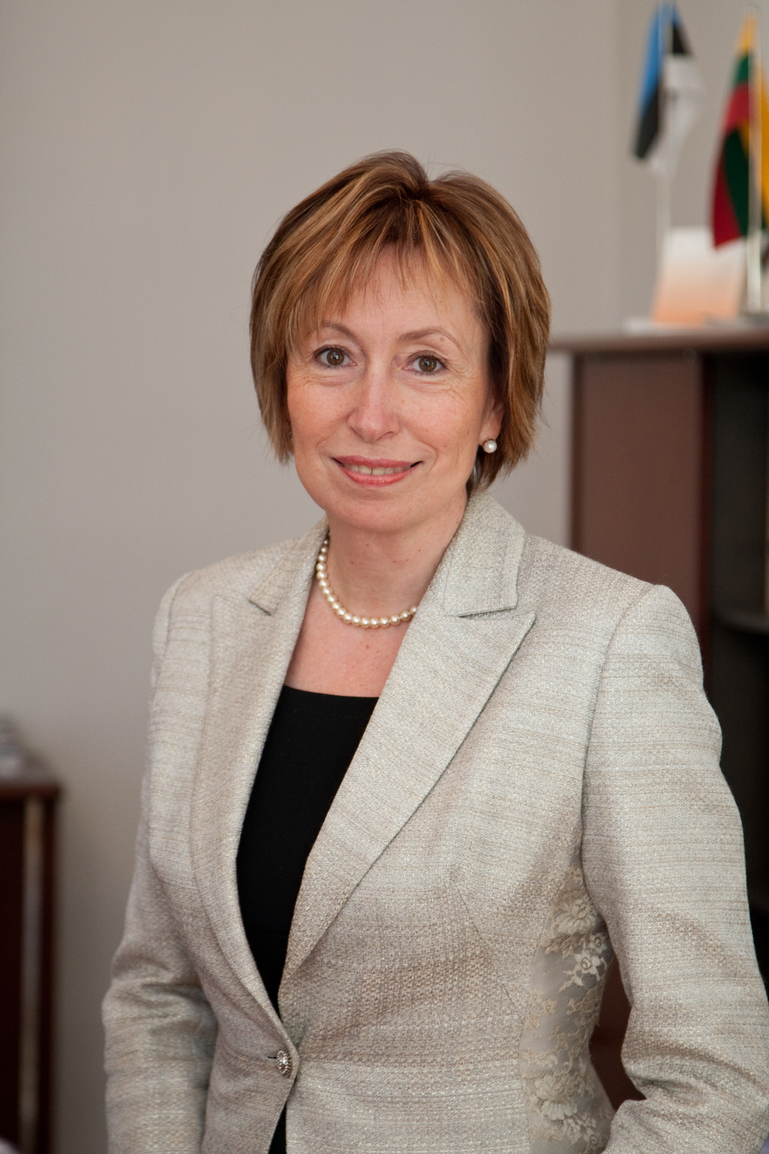 Tartu Ülikooli õppeprorektor professor Birute Klaas-Lang.